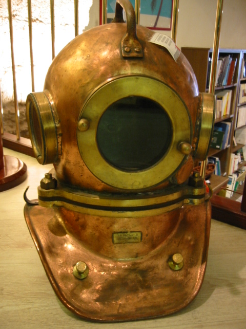 Vieux casque scafendrier